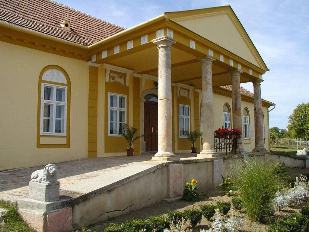 Kaštieľ Licensing Autorom fotografie je Imrich Šimonek z Dubníka Kategória:Presunúť_na_Commons